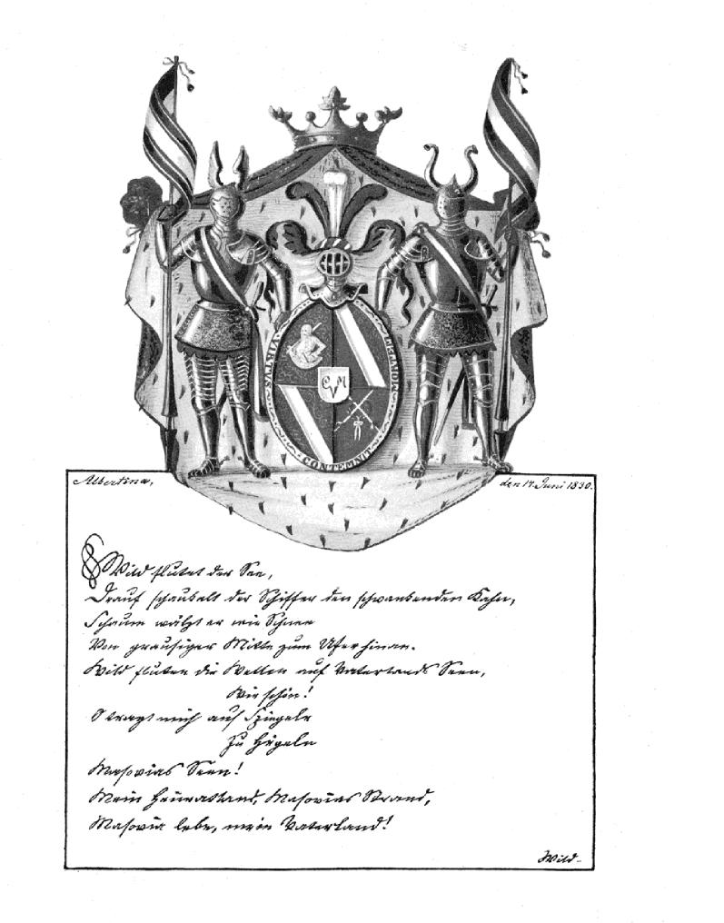 "Des Masuren Wanderlied" von Friedrich Dewischeit mit dem alten Wappen des Corps Masovia (bis 1848)